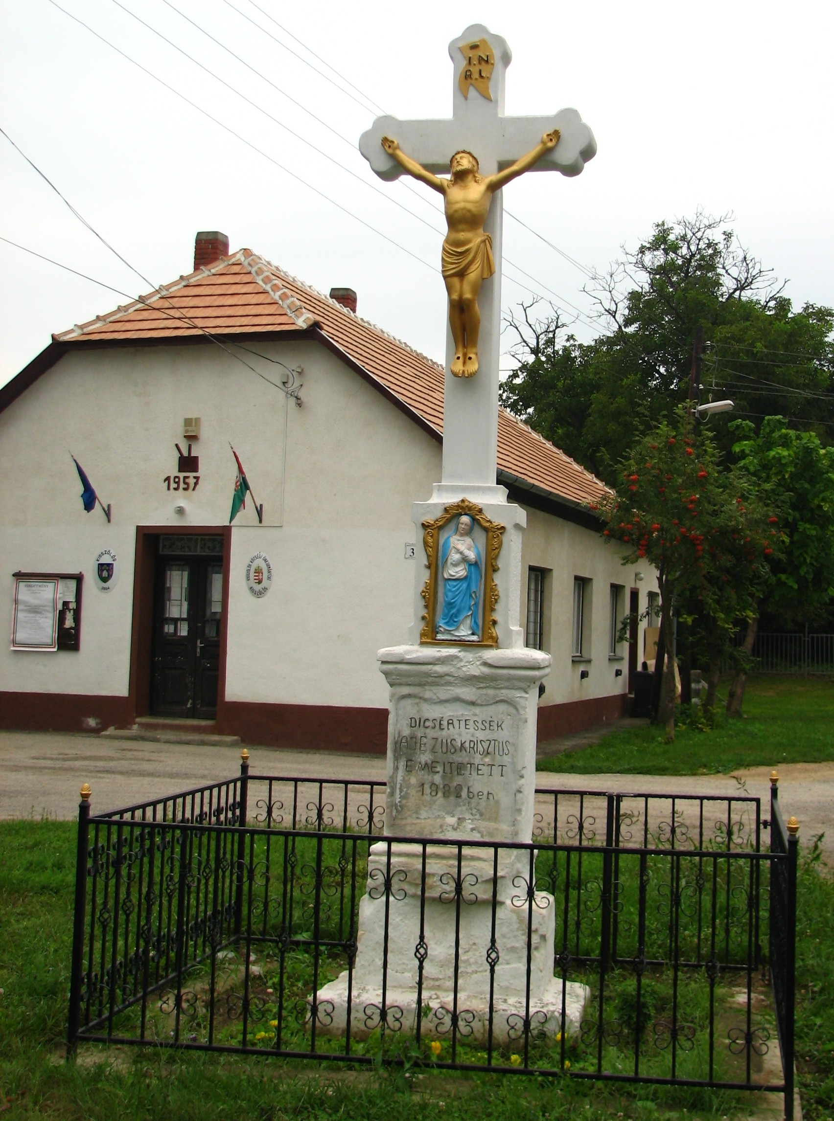 Emlékkereszt (1882), háttérben polgármesteri hivatal (Kisszőlős, Veszprém megye)